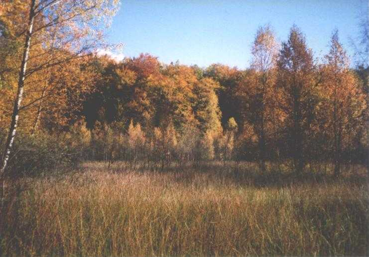 Großes Kesselmoor in Hullerbusch (Gemeinde Feldberger Seenlandschaft, Landkreis Mecklenburg-Strelitz).